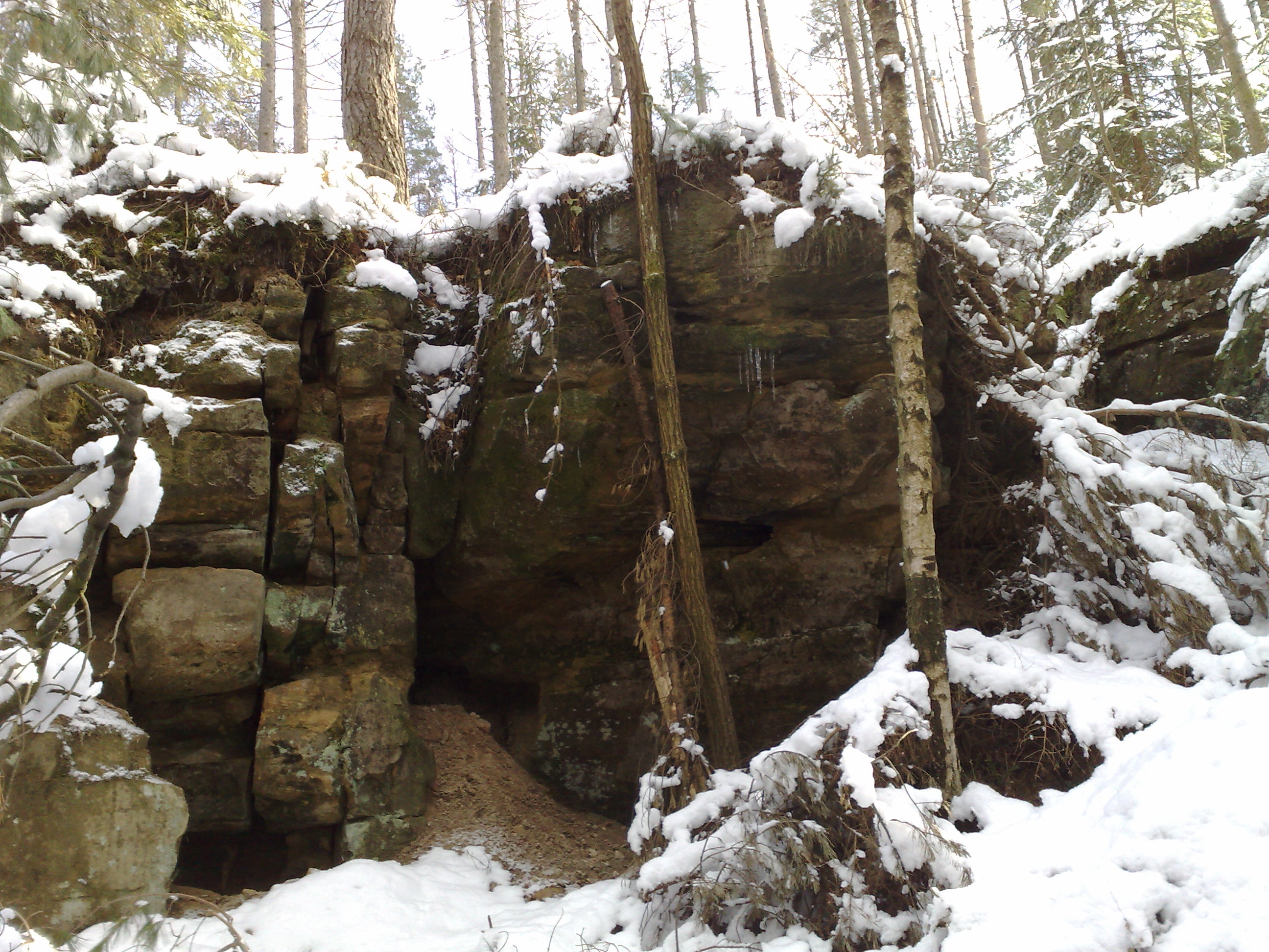 Eisbachklamm-April-2008